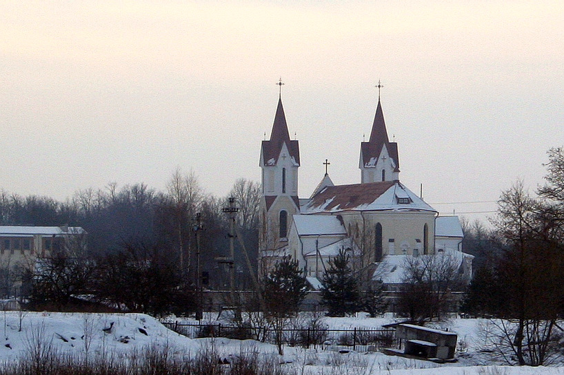 Švenčionys, Lithuania